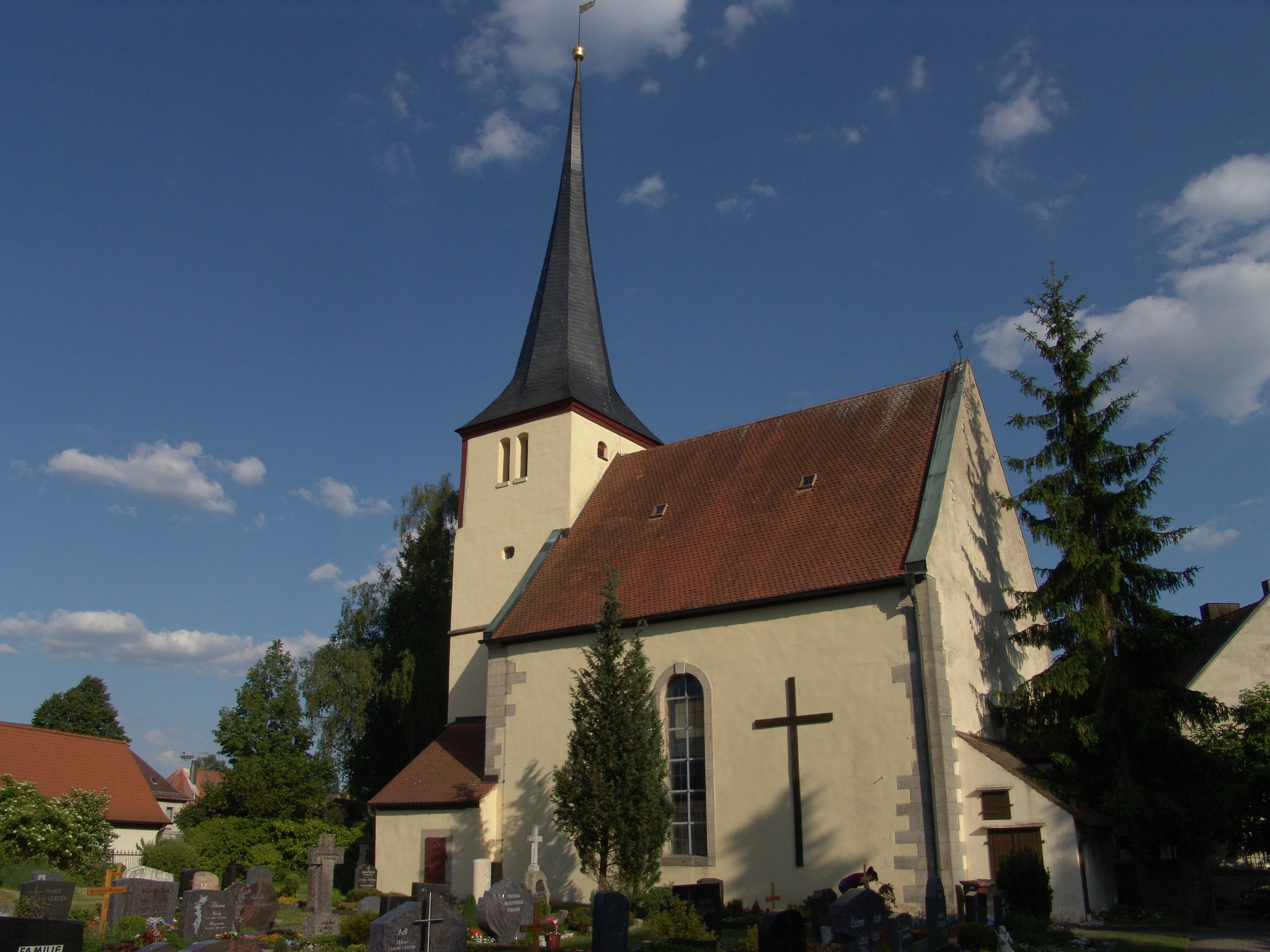 evang.-luth. Kirche St. Marien in Dachsbach